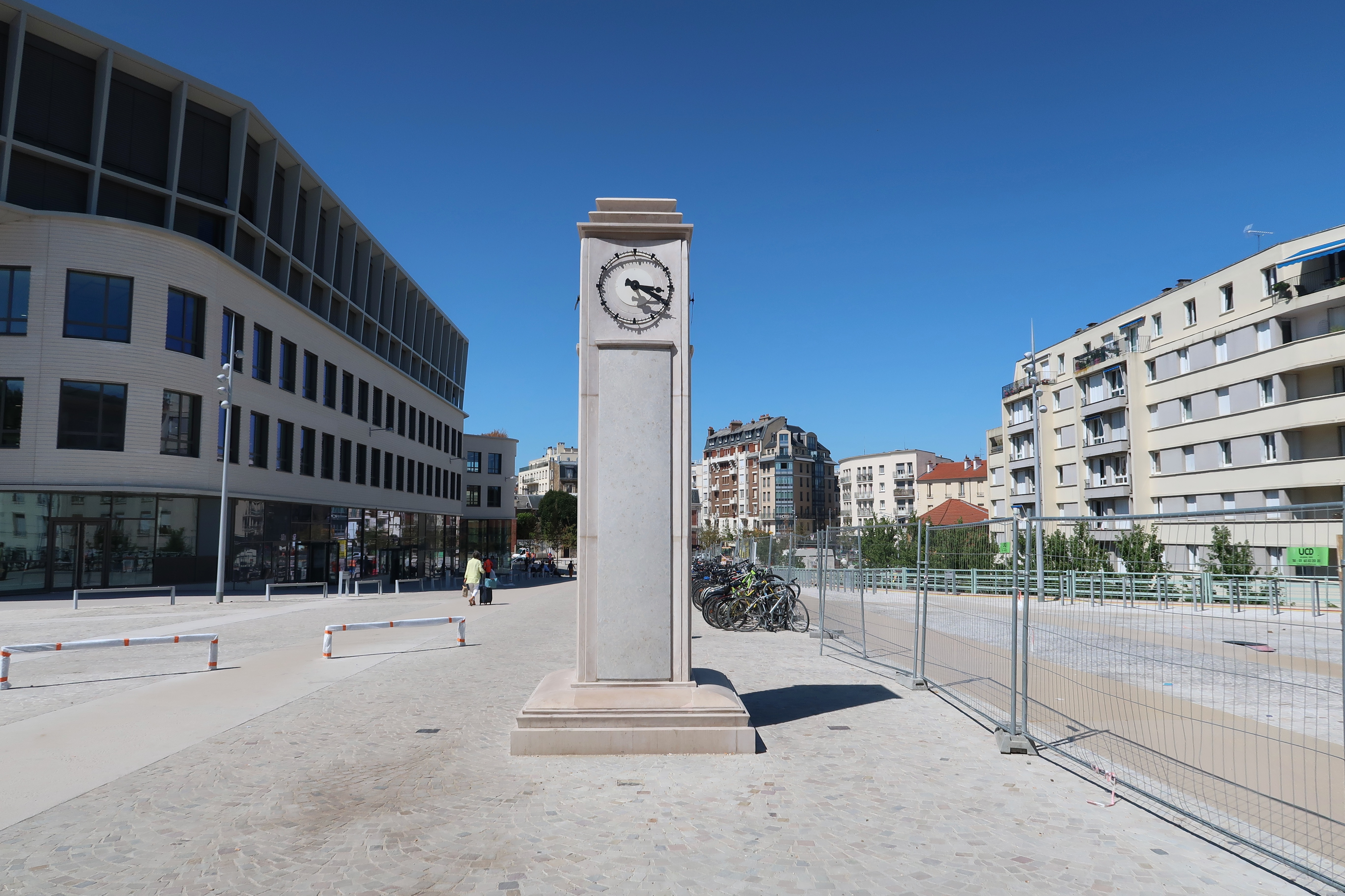 Parvis Colonel-Arnaud-Beltrame la gare de Versailles-Chantiers (Yvelines).